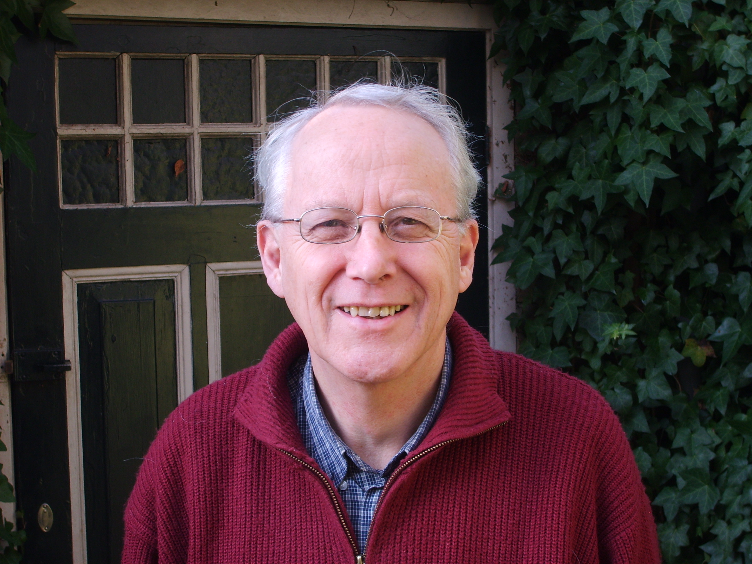 Hans Werkman